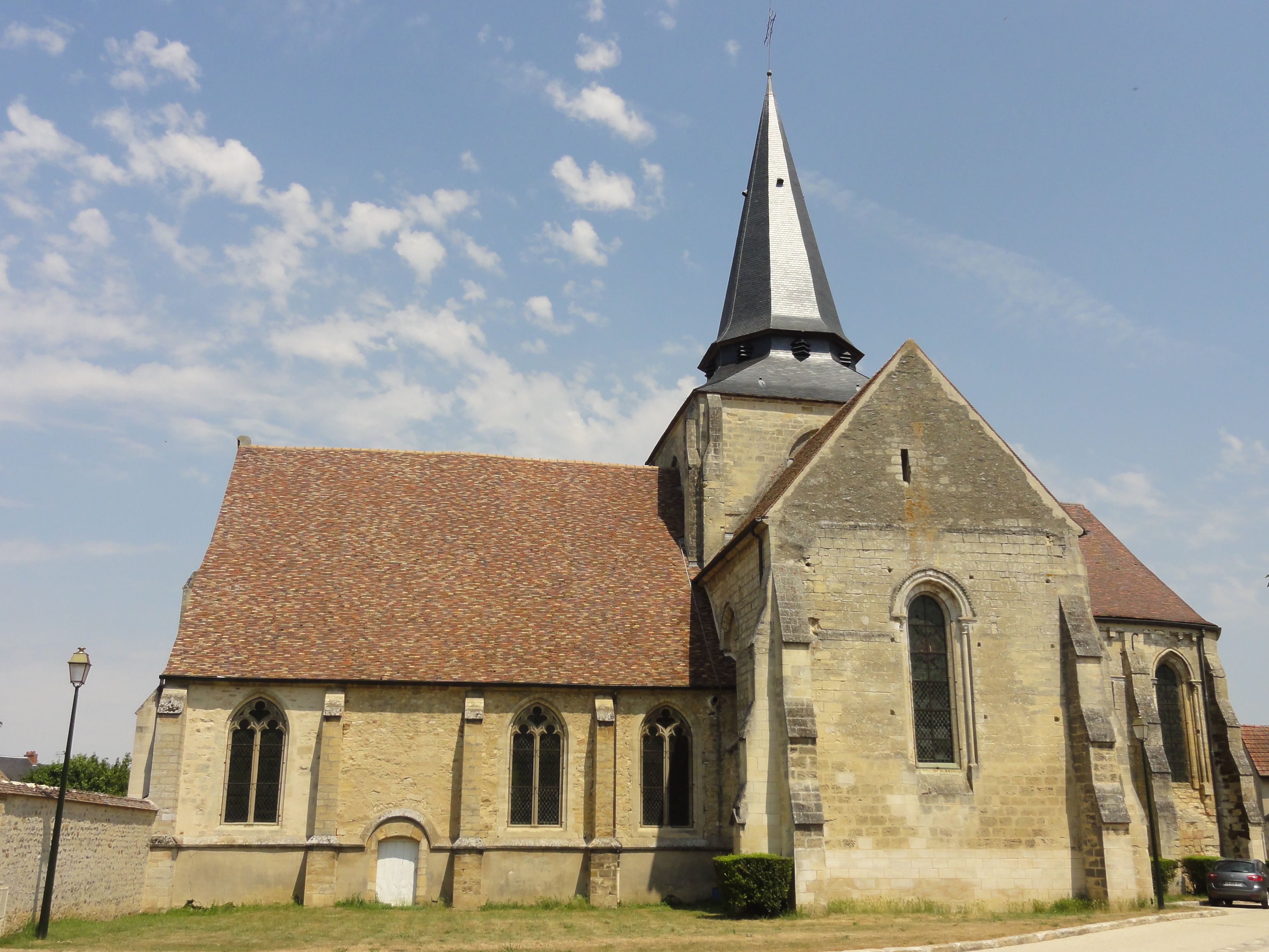 Église Saint-Lucien d'Avernes (voir titre).